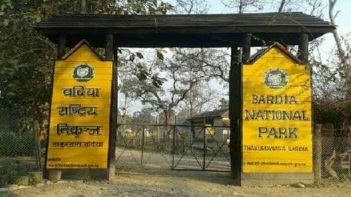 यह ठाकुर द्वारा का मुख्य प्रवेश गेट है बर्दिया नेशनल पार्क में जाने से पहले हमें इस गेट में प्रवेश करना होता है।